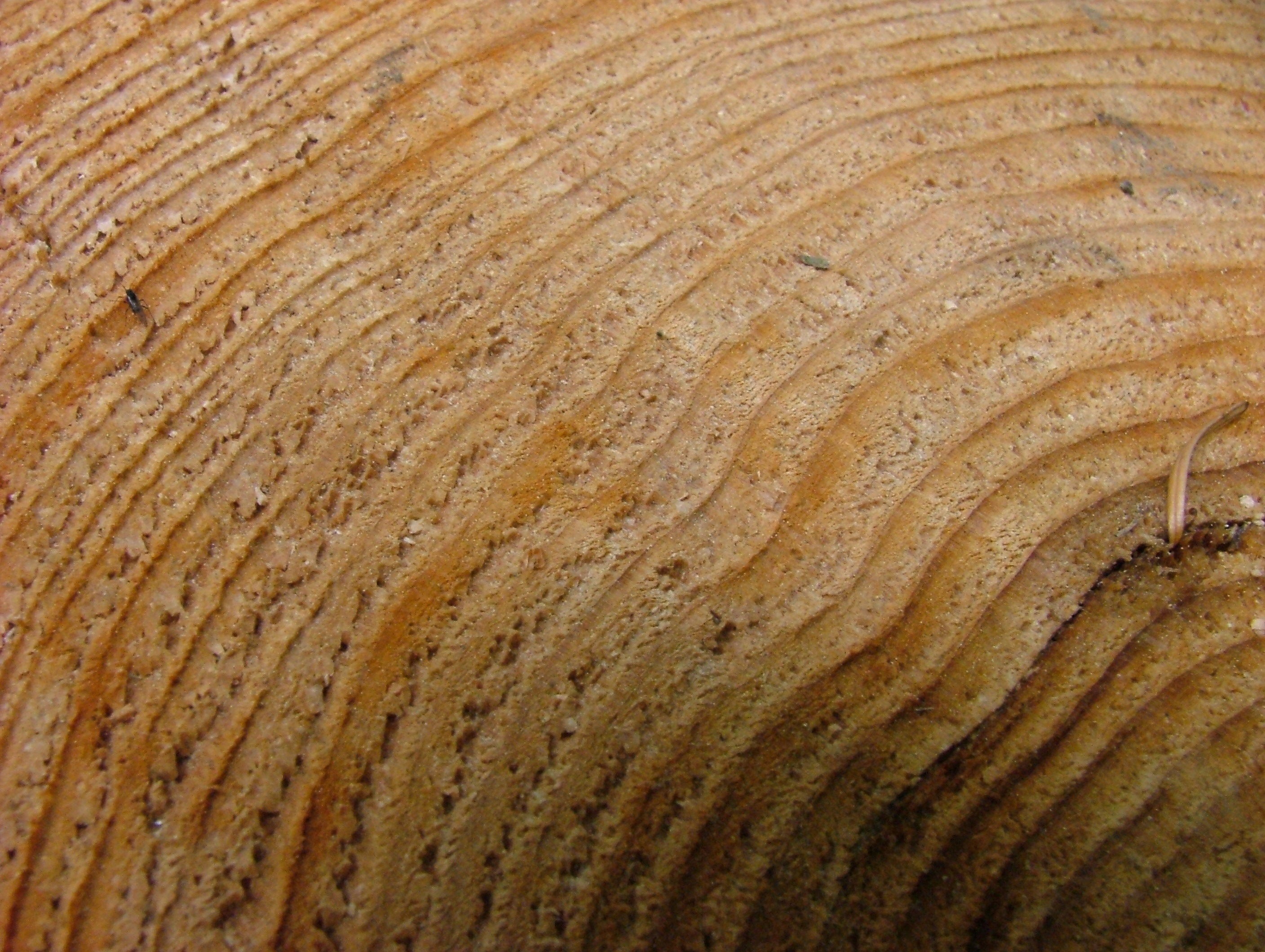 Anelli Legnosi di Picea abies